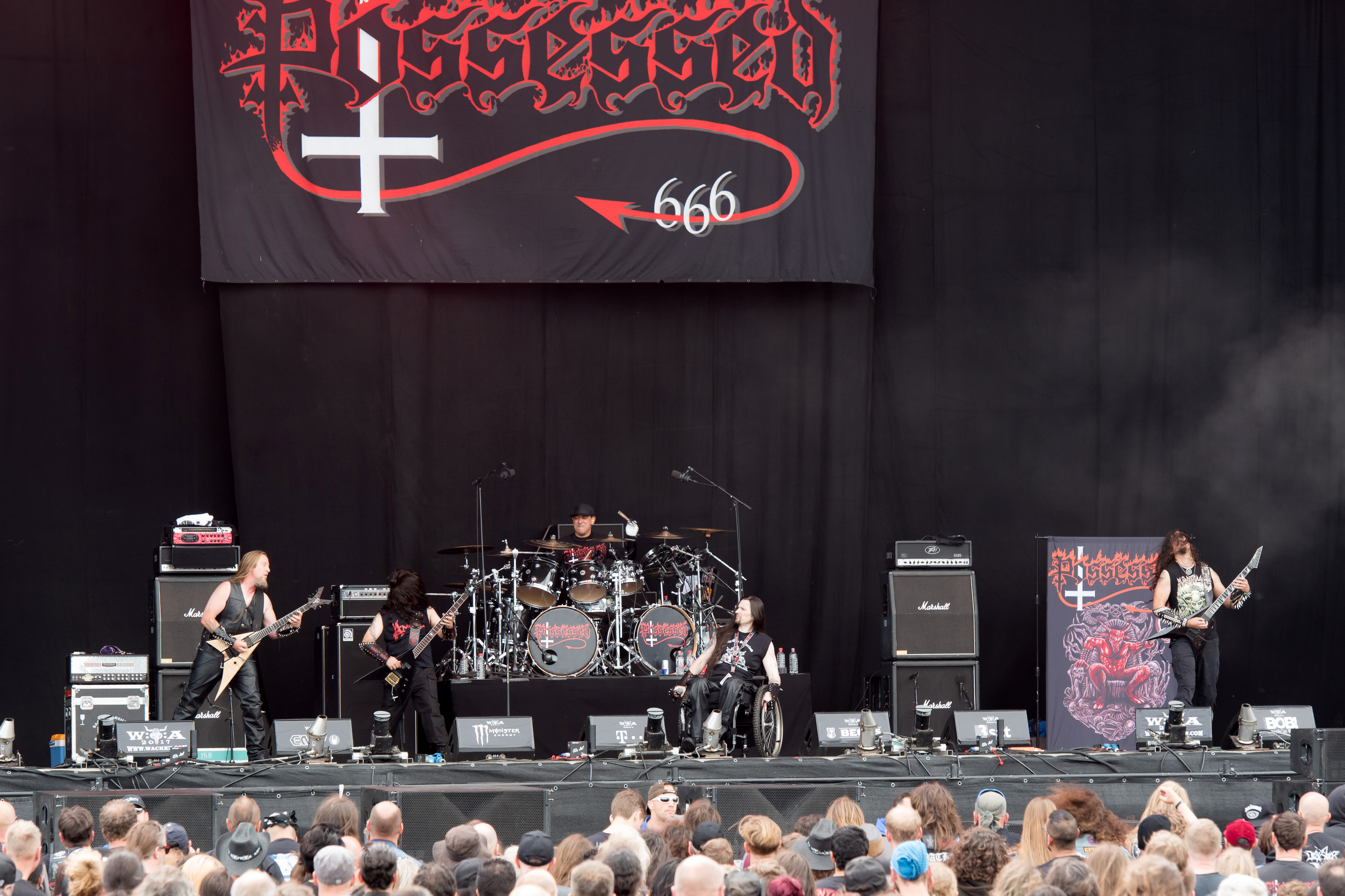 Possessed beim Wacken Open Air 2017